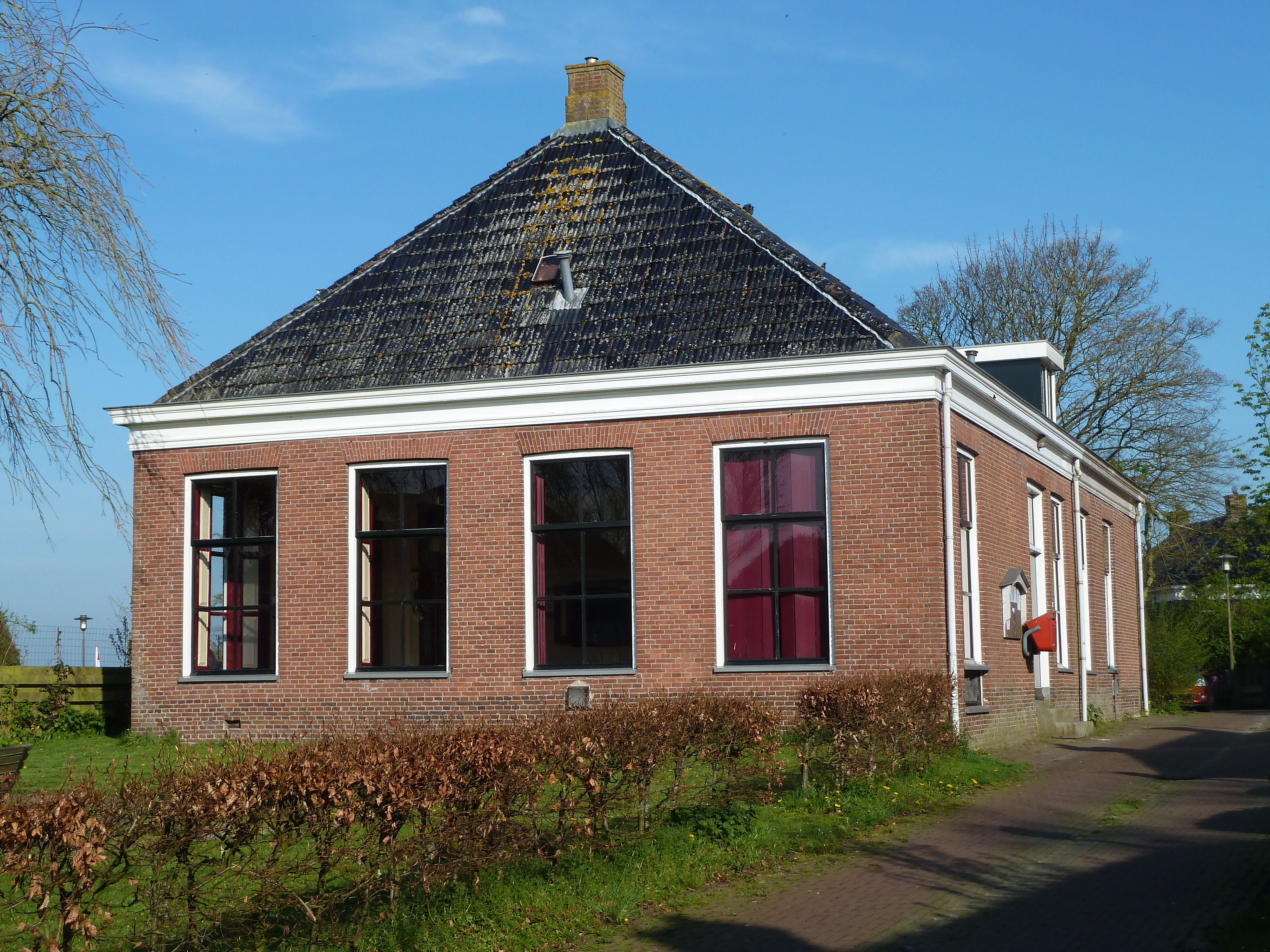 Vroegere pastorie van Stitswerd, nu dorpshuis.